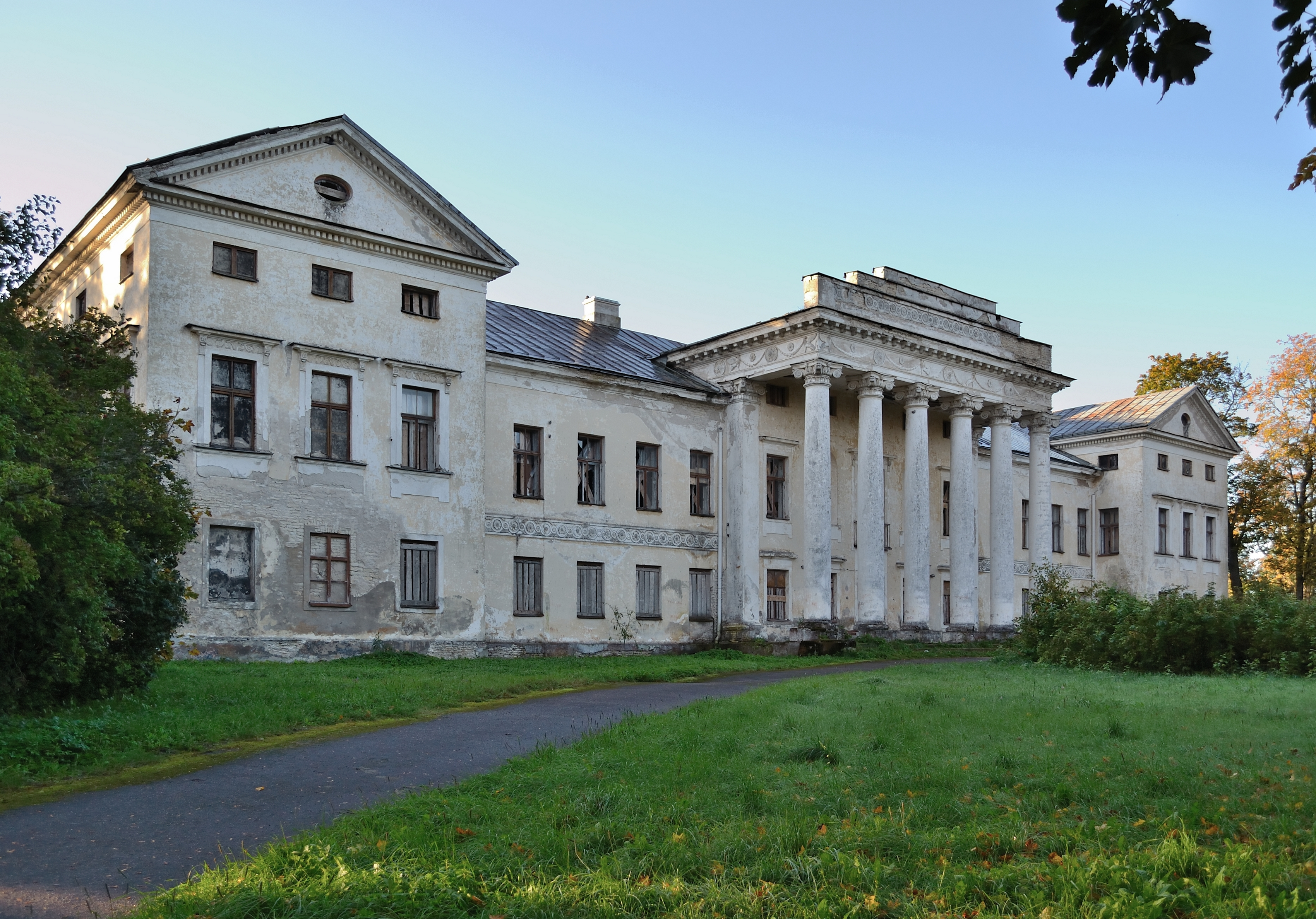 Riisipere mõisa peahoone, 1820